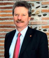 Patric Lasseube